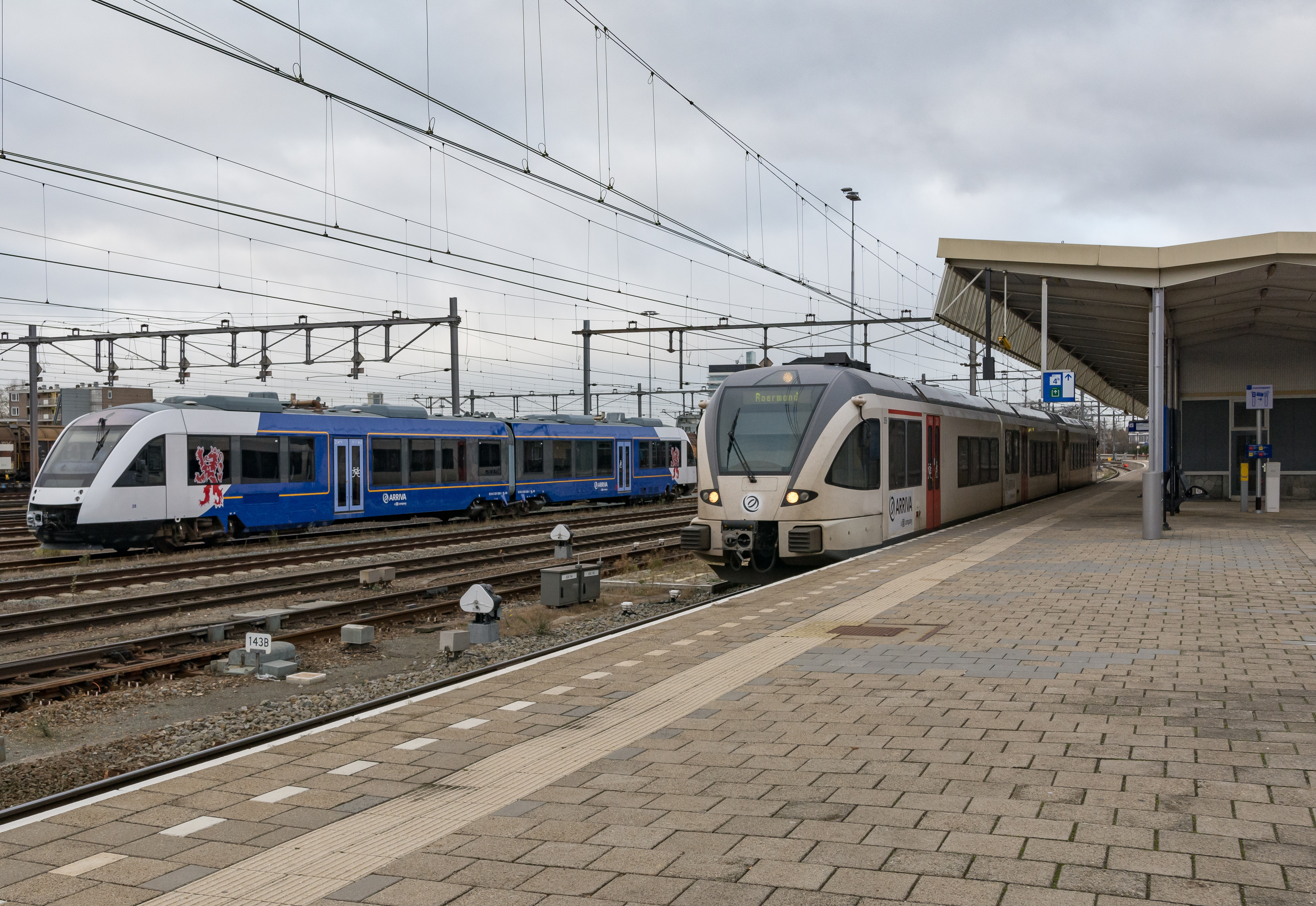 Veolia 359 (met Arriva bestickering) vertrekt uit Venlo als stoptrein 32249 naar Roermond. Op de achtergrond staat Arriva Lint 28, samen met een drietal anderen (buiten beeld). Deze stellen zullen begin december hun kilometers over de Maaslijn gaan maken. Volledige opstelling Linten zie hier